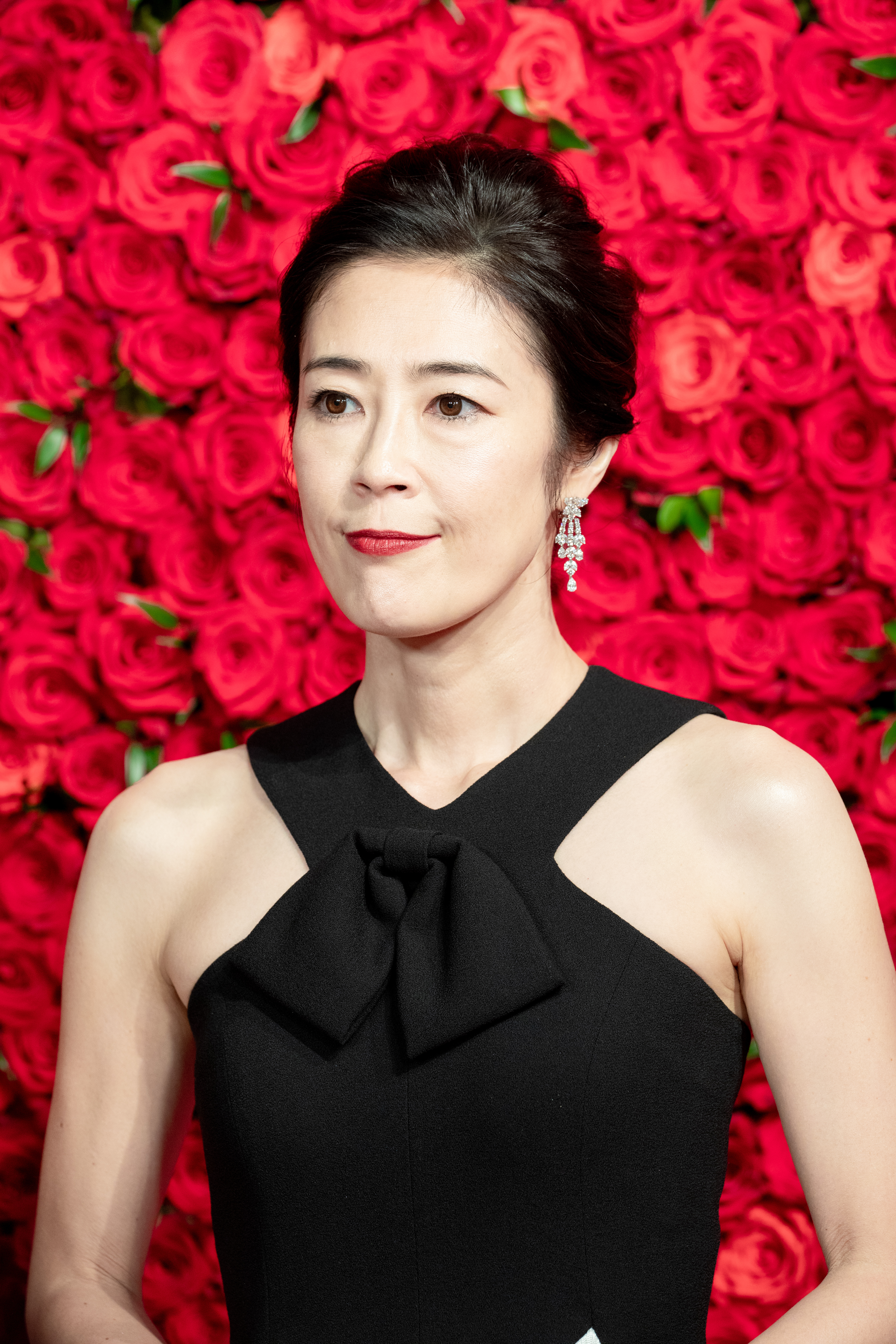 第30回 東京国際映画祭 オープニングセレモニー 寺島しのぶ (アリー/スター誕生)